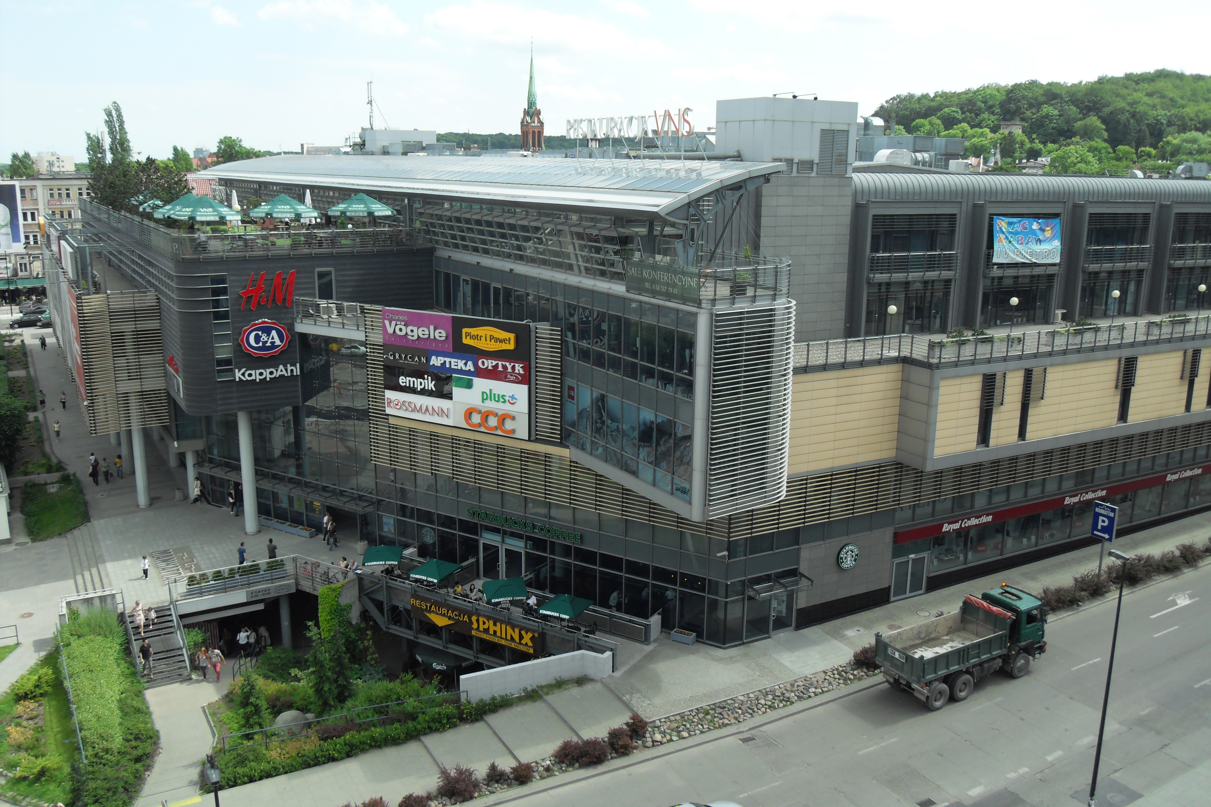 Gdańsk Wrzeszcz, Centrum Handlowe Manhattan.